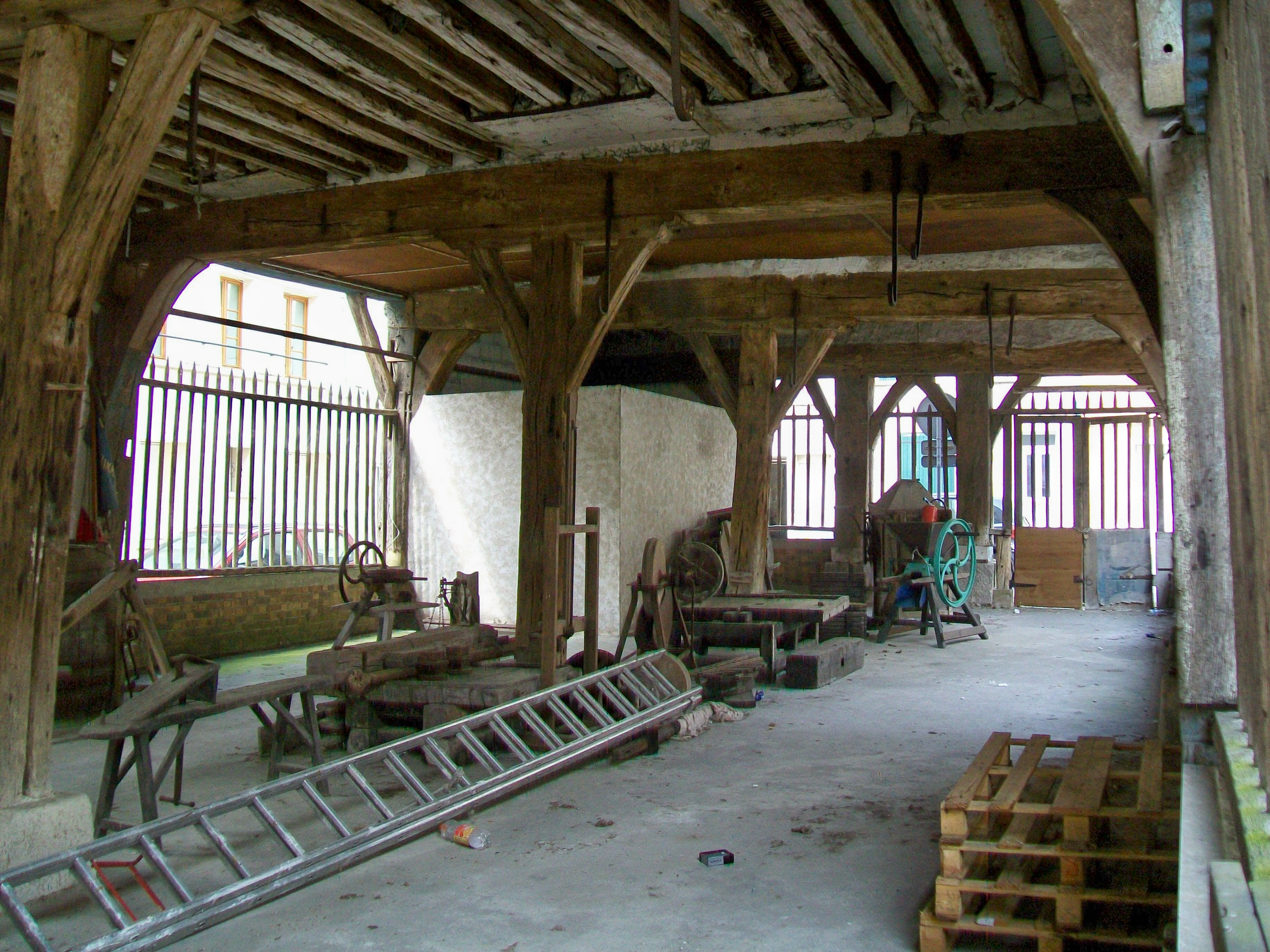 L'intérieur de la vieille halle, où quelques outils agricoles historiques ont été remisés.